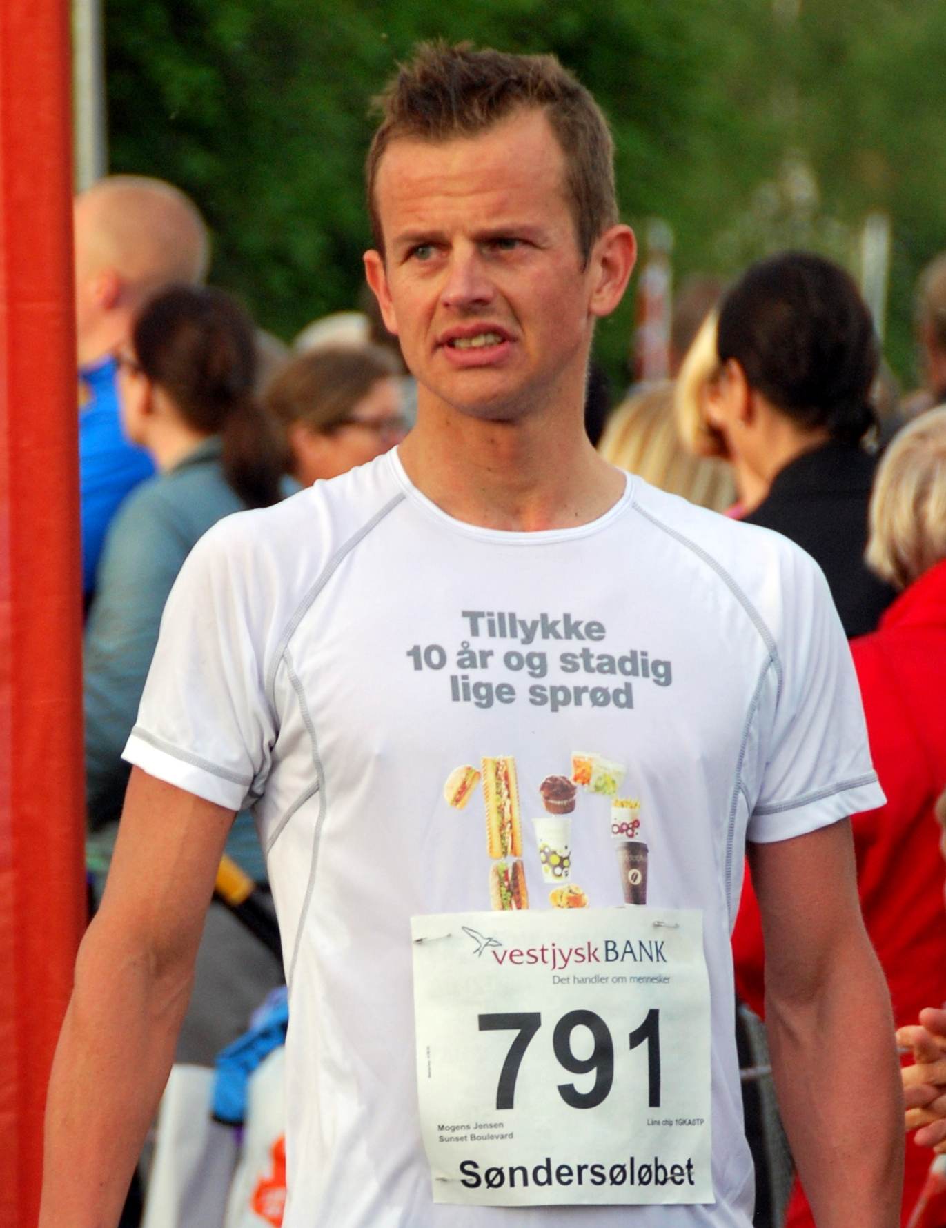 Mogens Jensen, dansk bjergbestiger og triatlet. Her efter Søndersøløbet 2012 i Viborg.